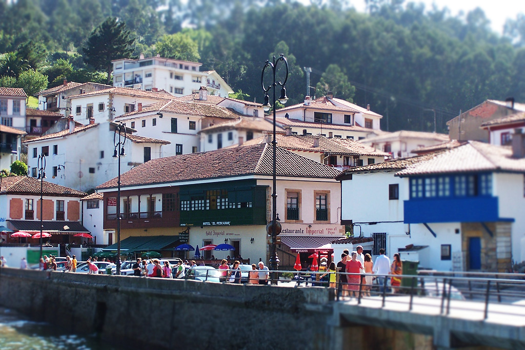 Localidad de Tazones, en Asturias, España